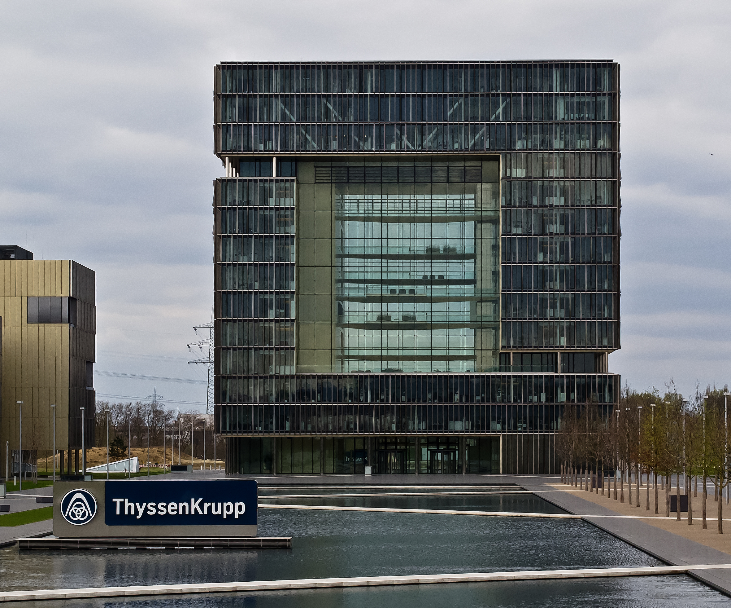 ThyssenKrupp (Konzernzentrale)